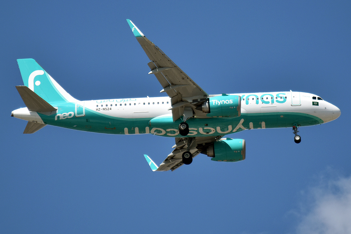 Flynas, HZ-NS24, Airbus A320-251N